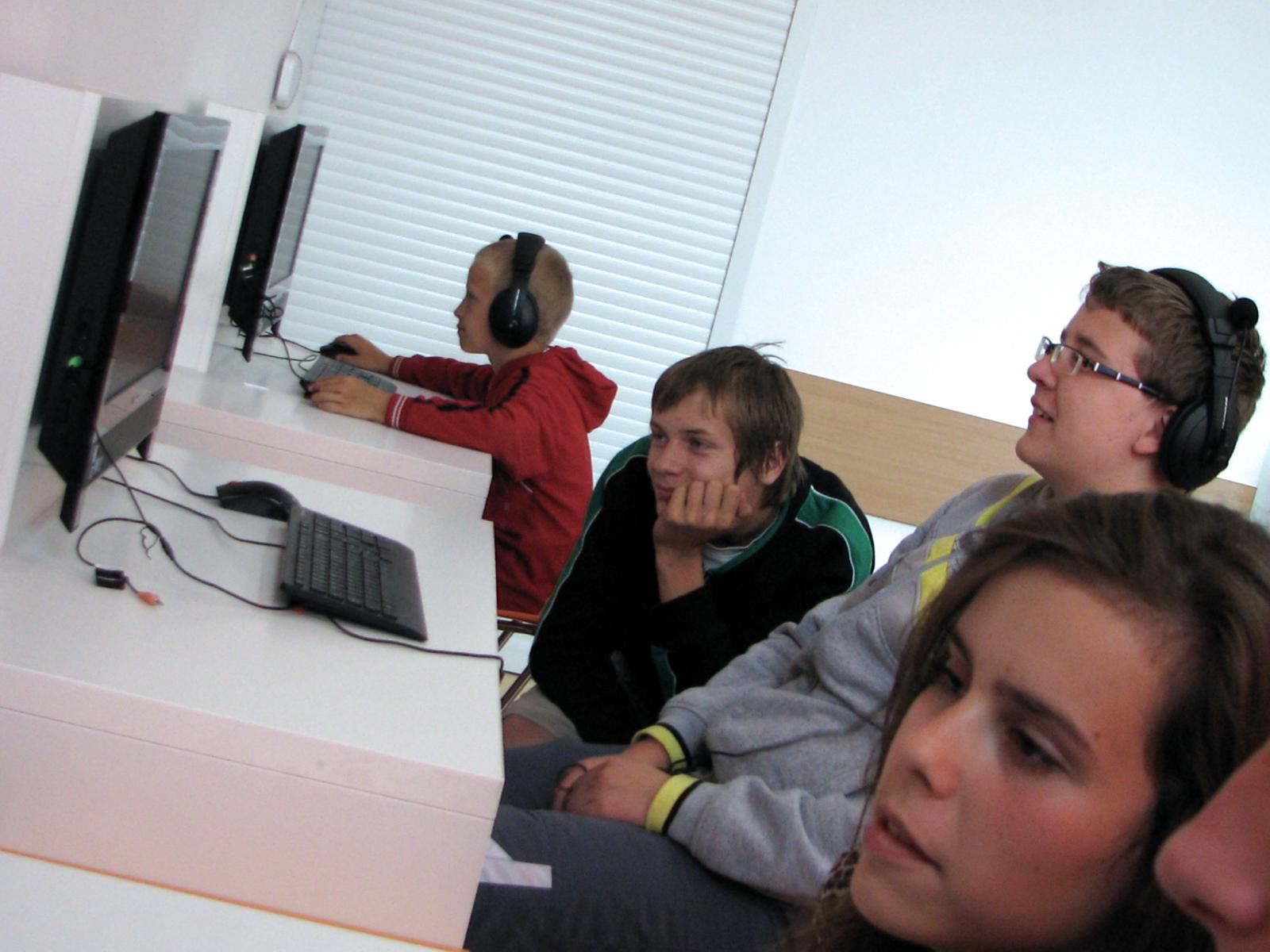 Wojcieszyce. Pracownia komputerowa